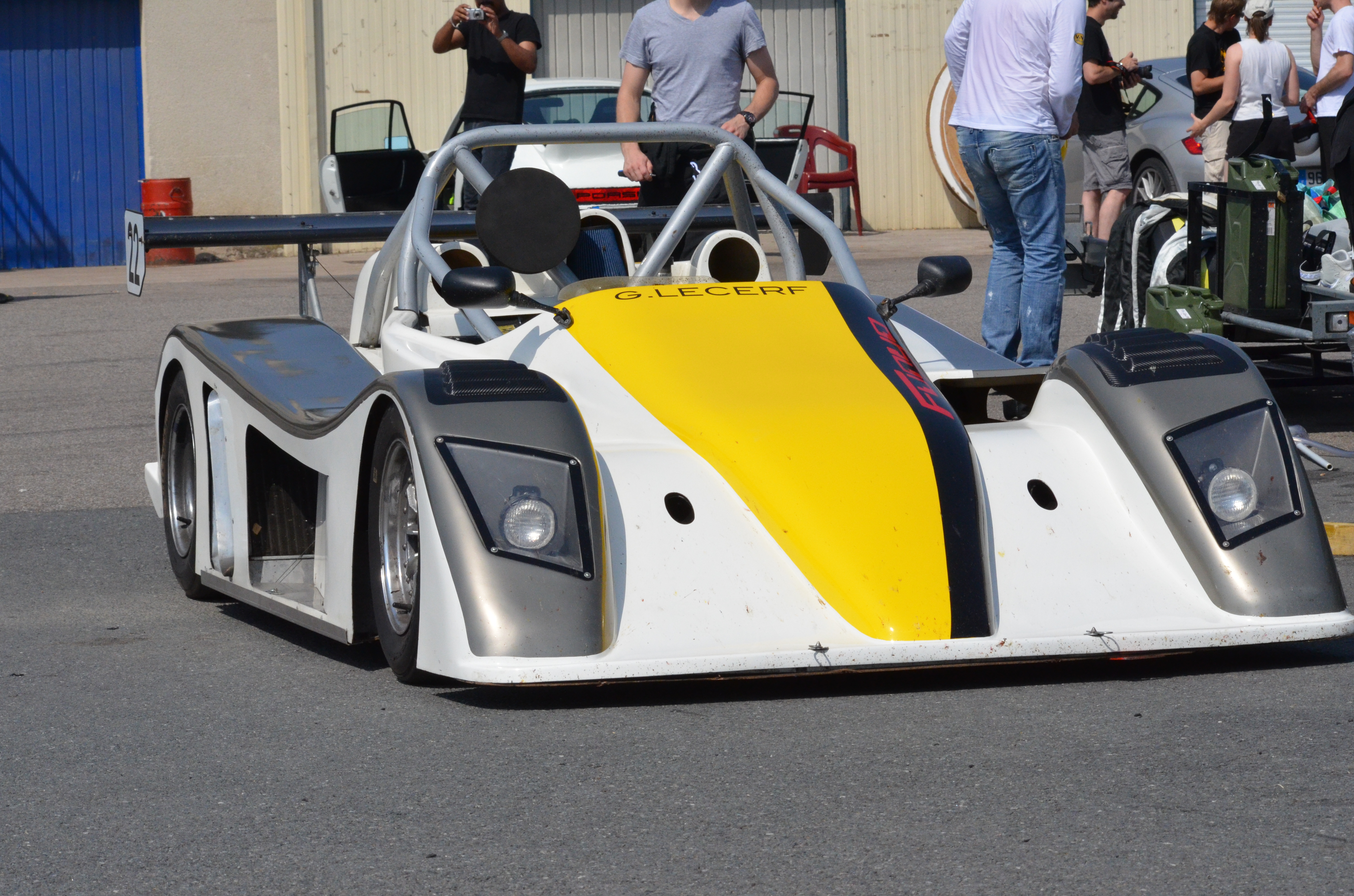 Funyo 4 RC de 3/4 face avant